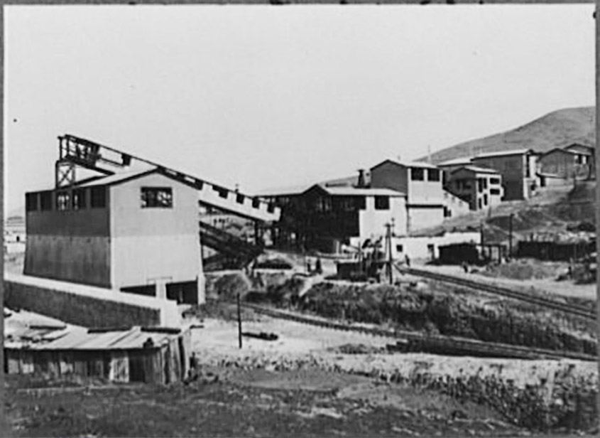 Siglo XX mine